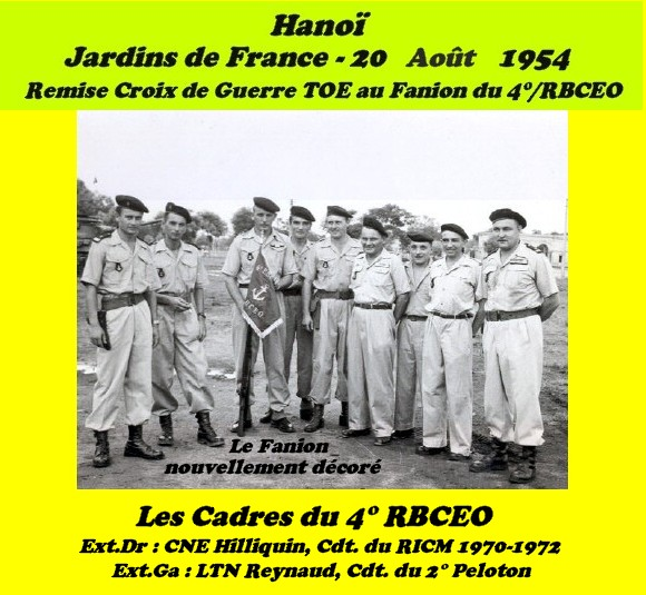 Offiziere u. U/Offiziere des 4.RBCEO mit Banner